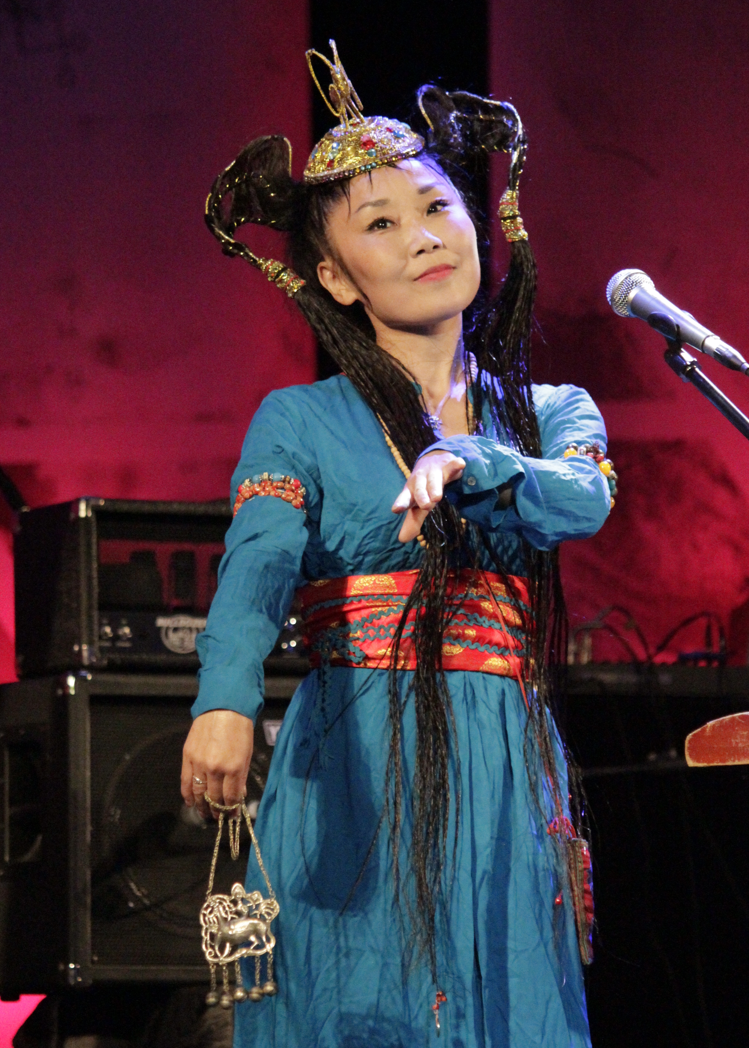 Namgar (Россия)